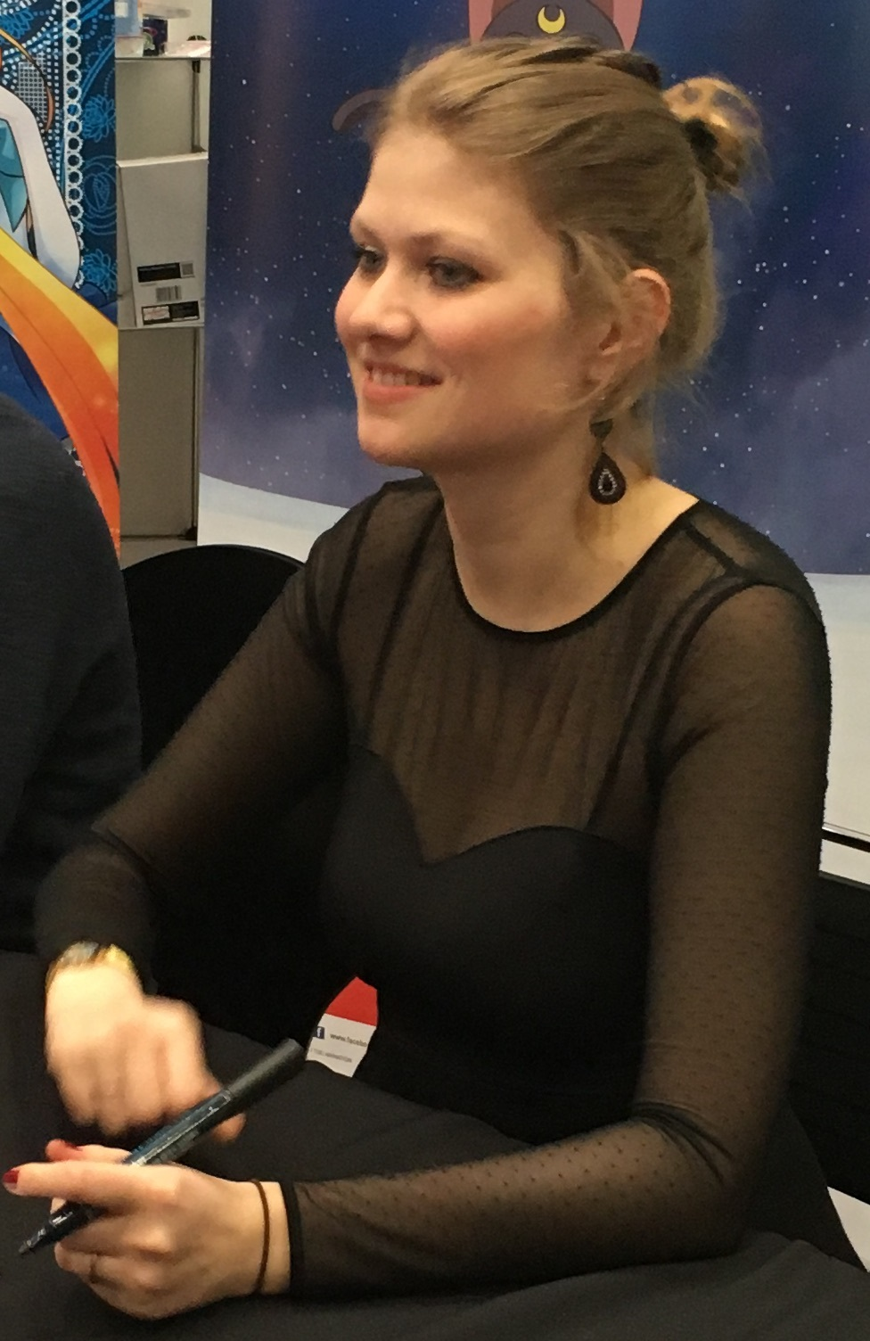 Lea Kalbhenn bei einer Autogrammstunde auf der Leipziger Buchmesse 2016.